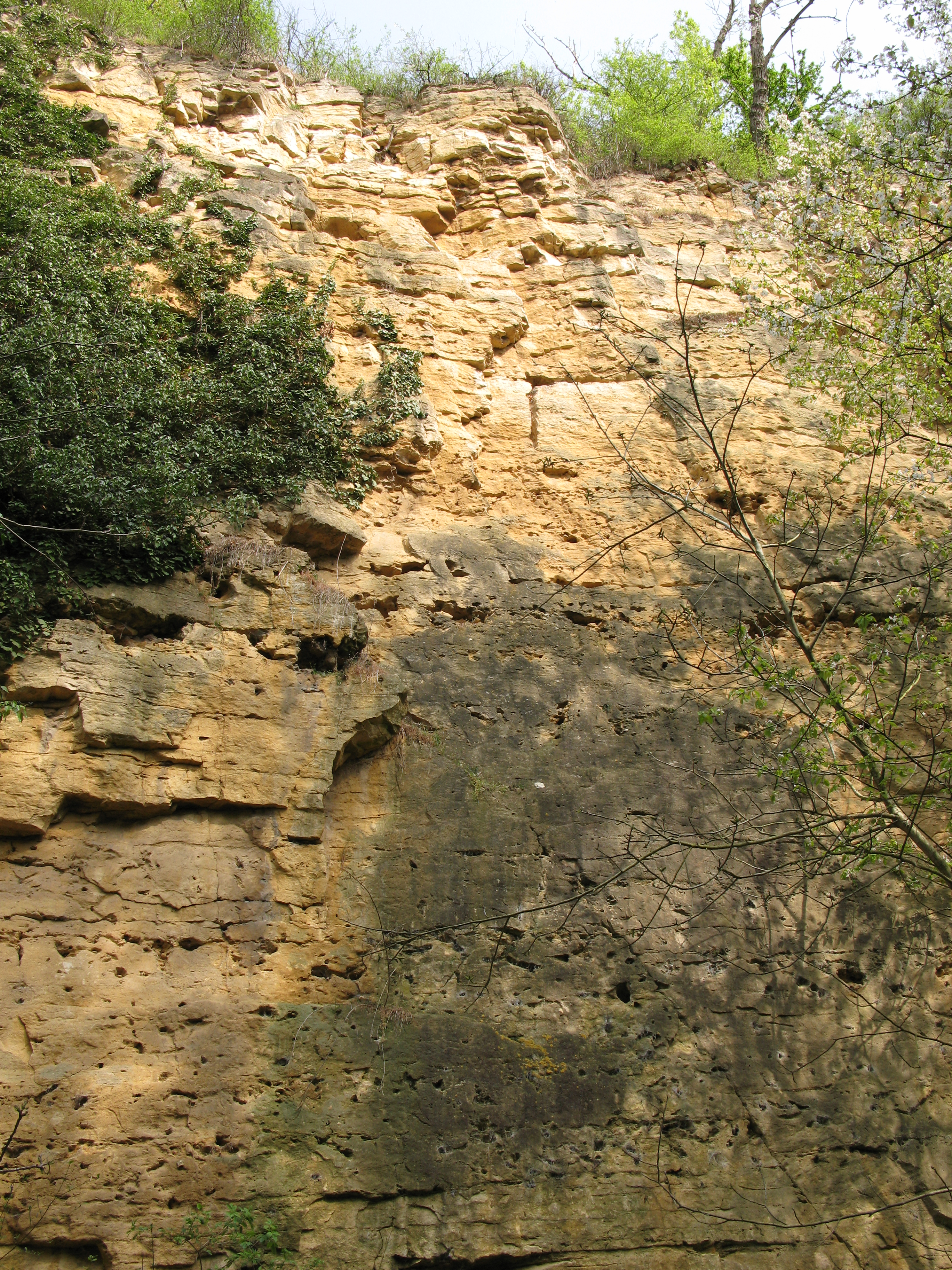 Naturschutzgebiet Steinbruch Ehrleshalden bei Herbolzheim im Landkreis Emmendingen.